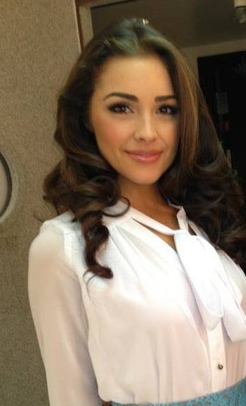 Carlos Otero and Olivia Culpo